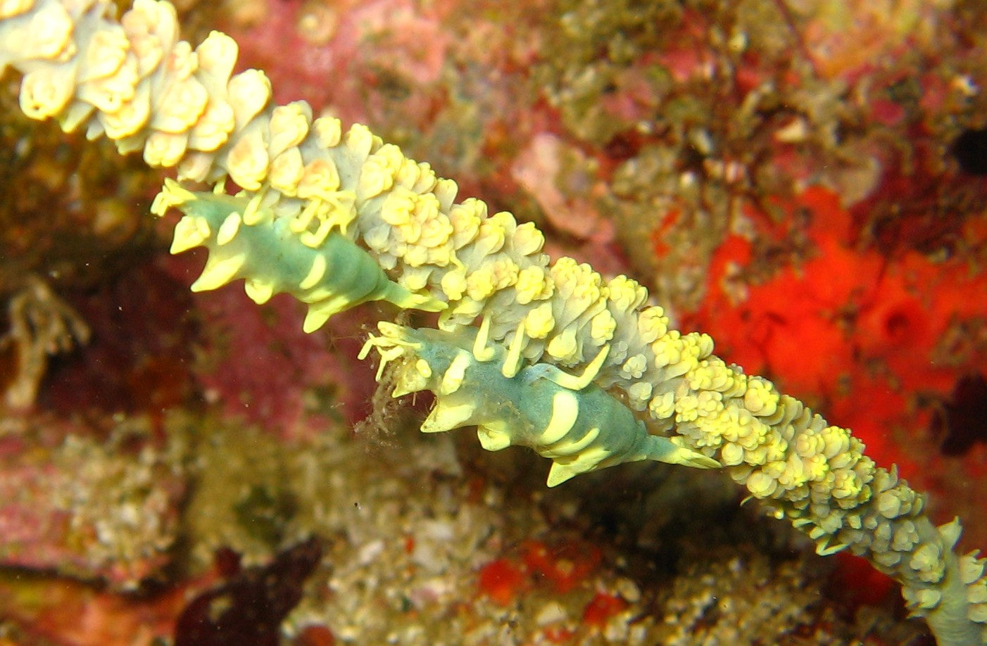 Miropandalus hardingi, in Kashiwajima Kohchi-ken(Prefecture), Japan